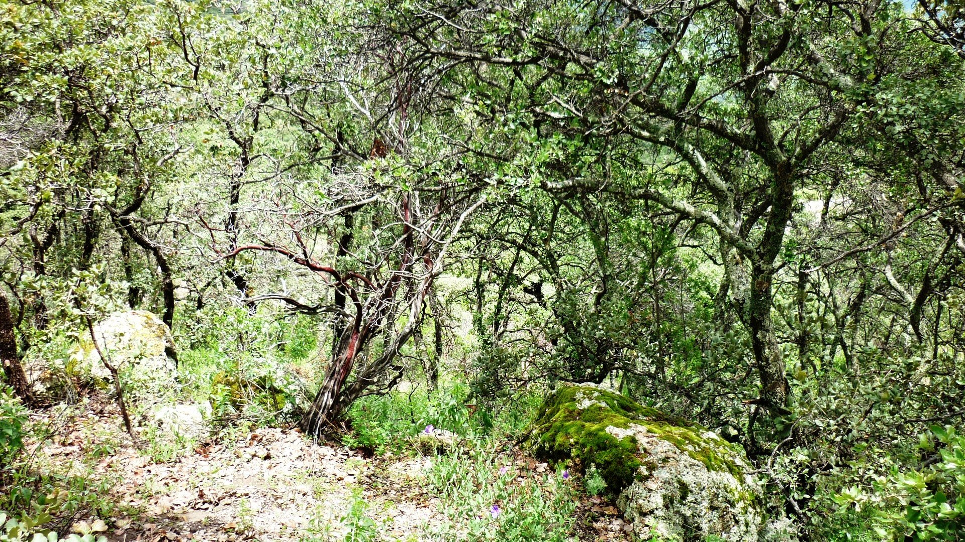 Abundante flora en la Sierra de Morones